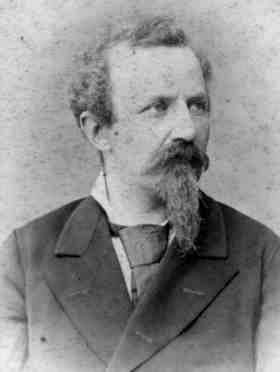 Alfonso Cossa (1833-1902), chimico italiano